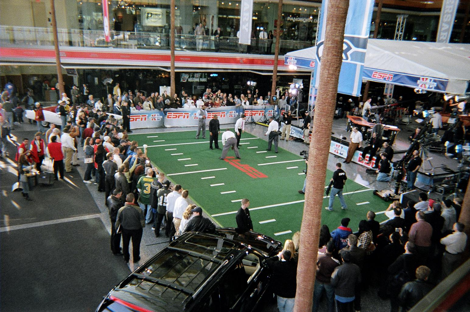 self made